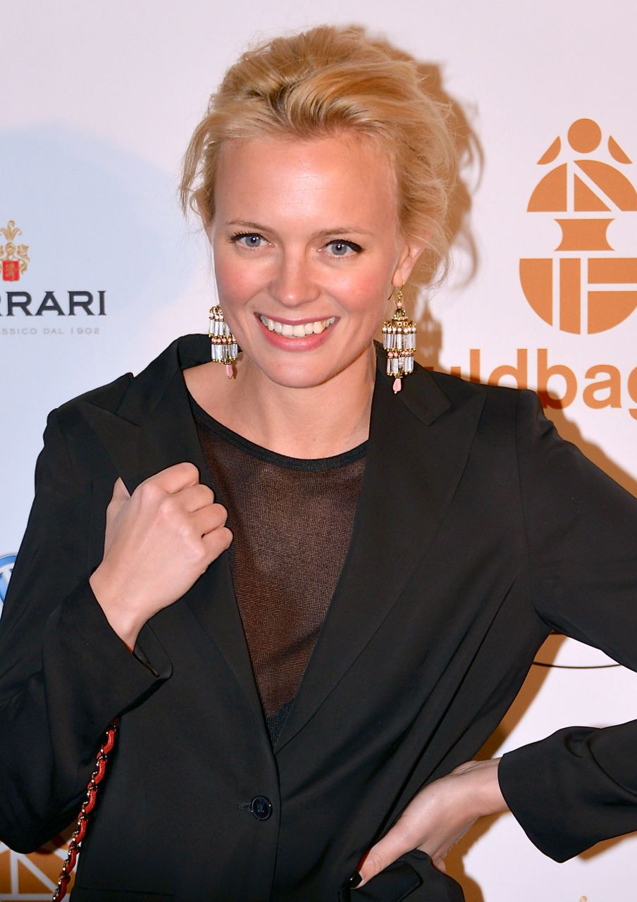 Josephine Bornebusch på på Guldbaggegalan 2013 den 21 januari 2013.